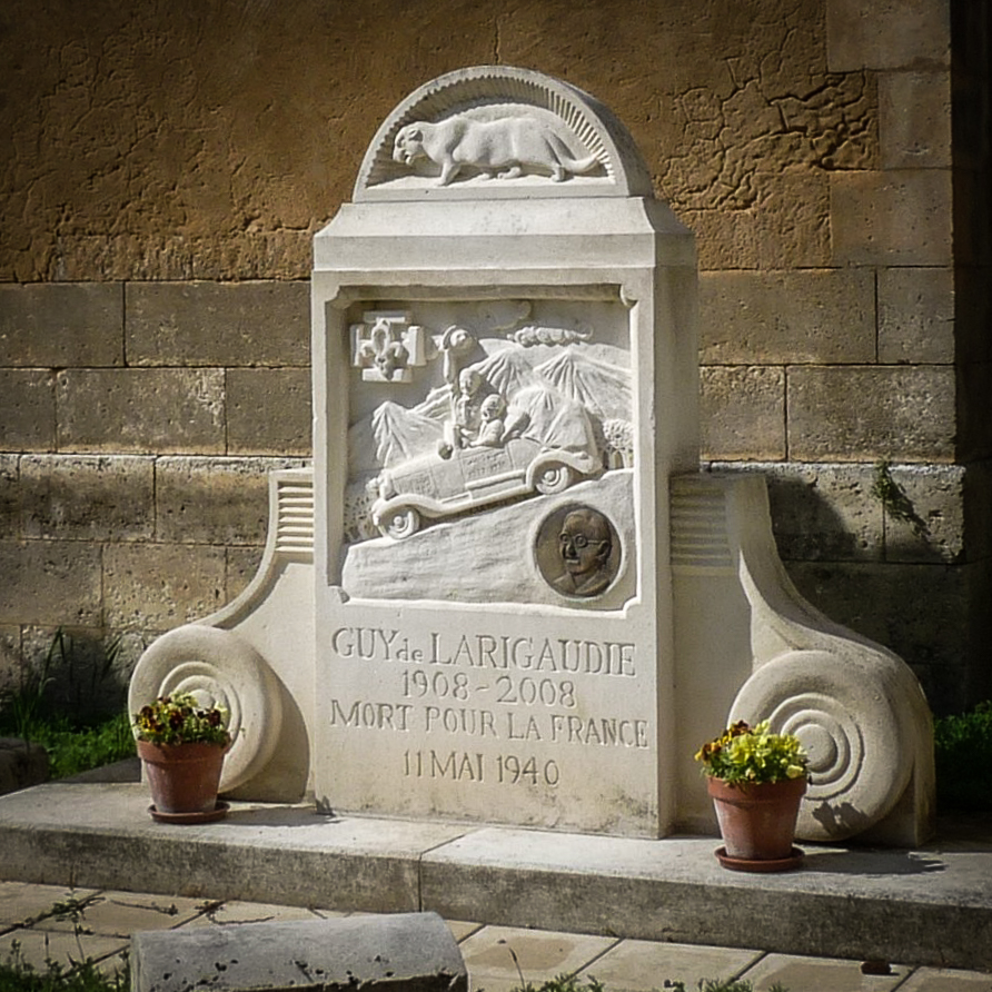 Stèle Guy de Larigaudie, église de Saint-Martin-de-Ribérac, Dordogne, France